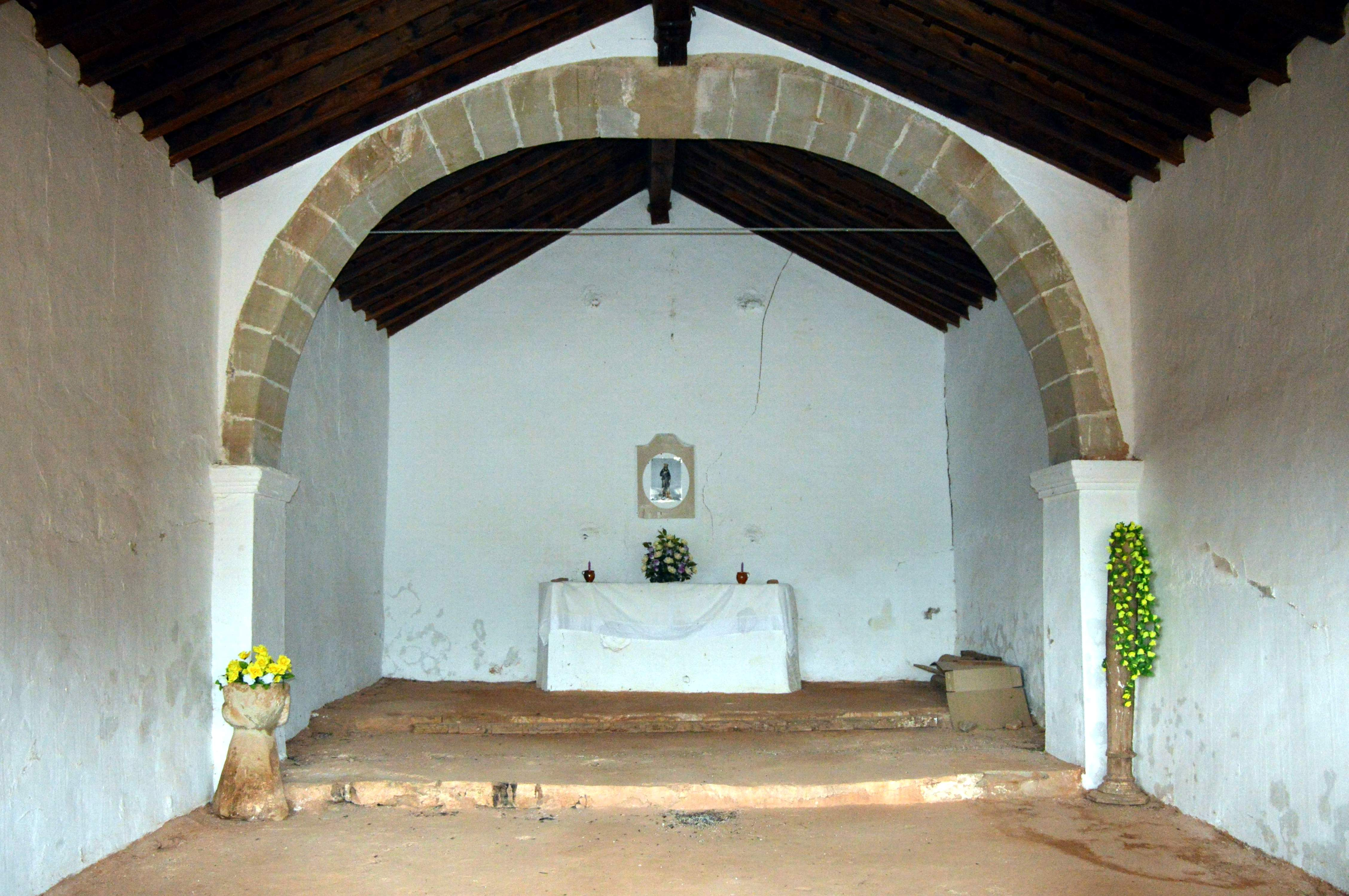 Interior de la Ermita de San Roque en Puebla de San Miguel (Valencia), detalle de la nave, arco toral y presbiterio (2019).